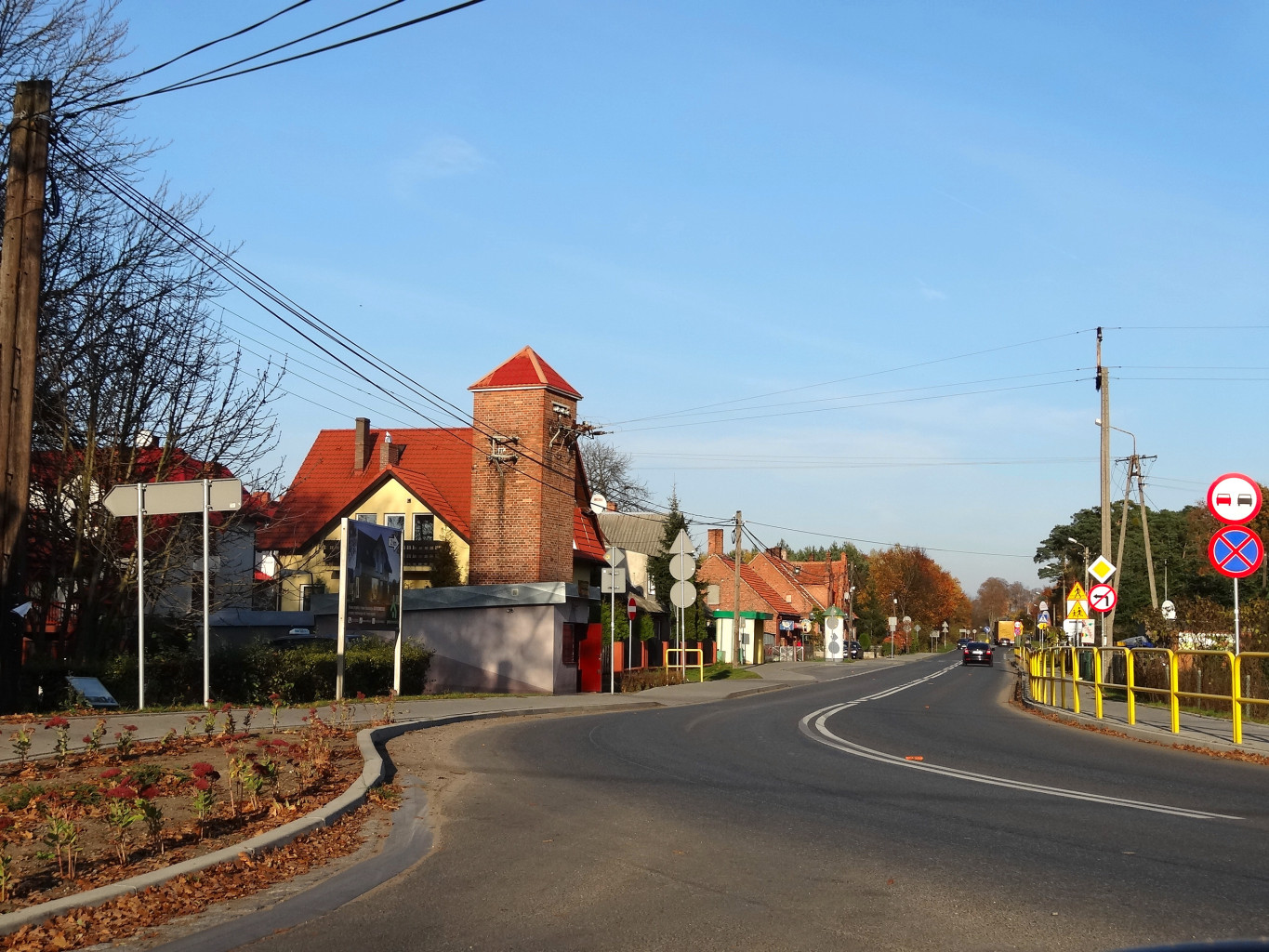 Wieś Ostromecko koło Bydgoszczy